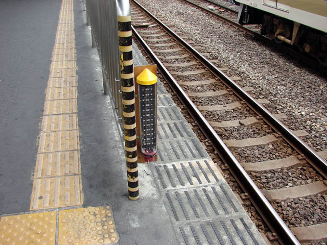 新今宮駅TC-PAC